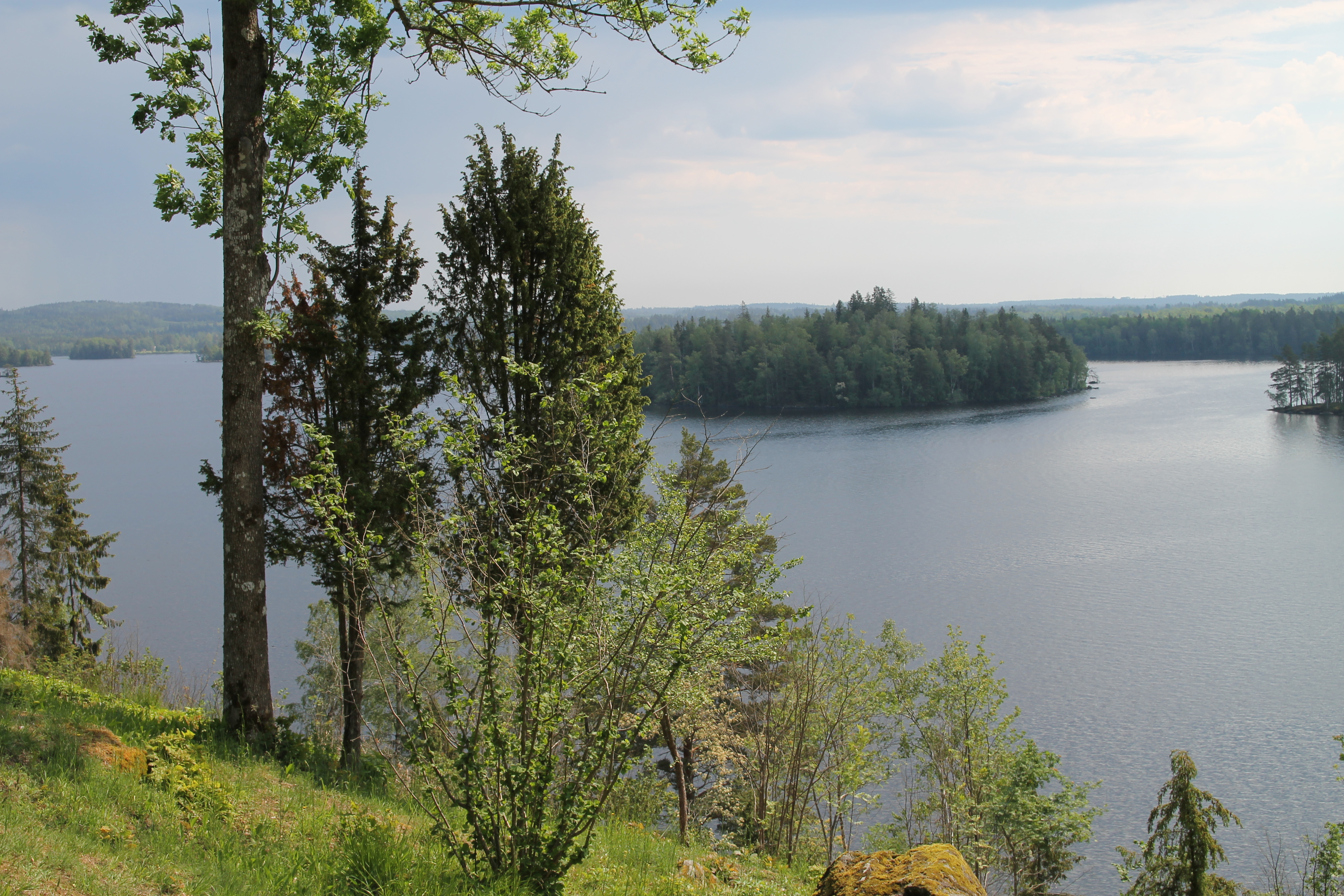 Högakull naturreservat med utsikt över sjön Rymmen